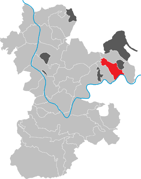 Karte von Stadtprozelten im Kreis Miltenberg, Bayern, Deutschland.